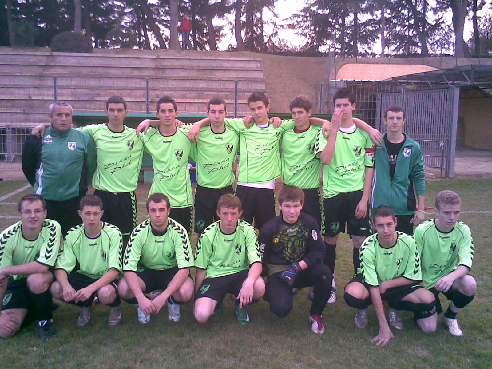 Club de foot amateur, équipe de jeunes